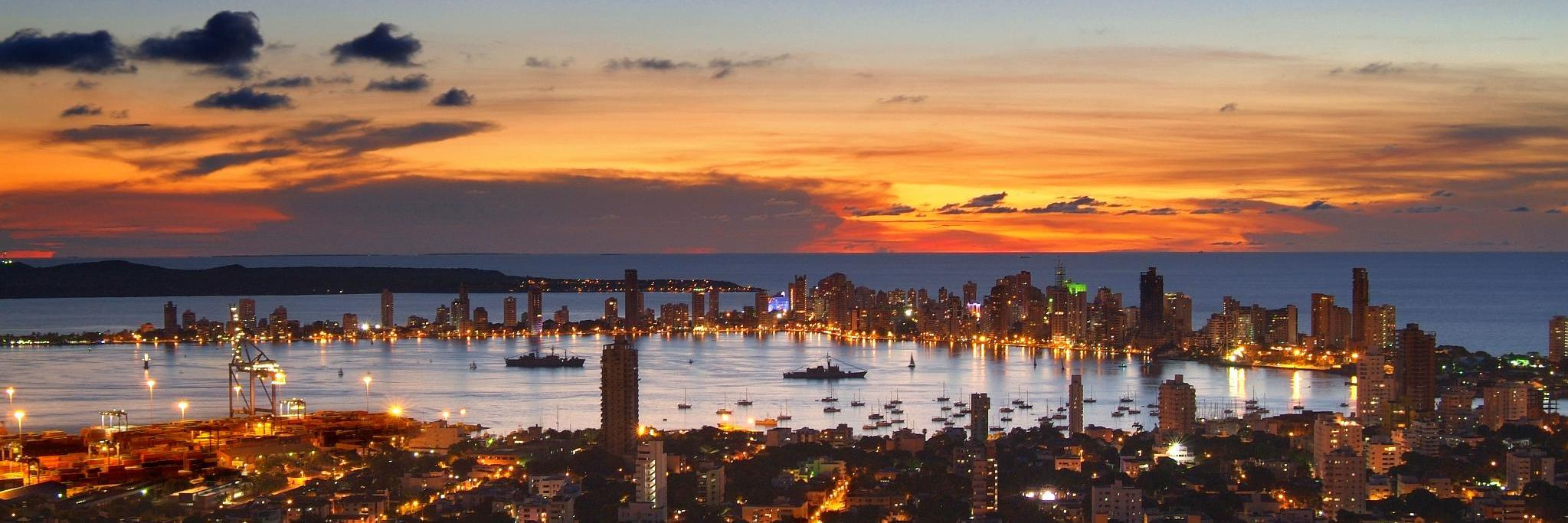 Atardecer en la bahia de Cartagena de Indias, Colombia. Vista desde el Cerro La Popa.